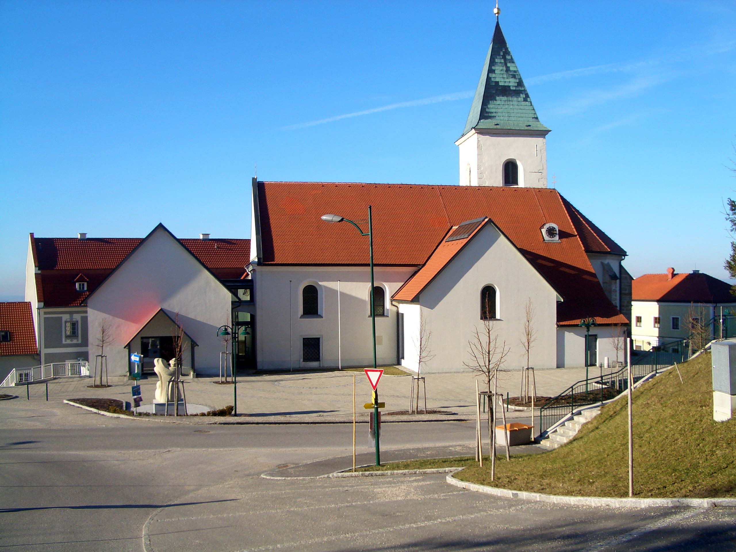 Pfarrkirche Behamberg nach der im Jahre 1999/200 durchgeführten Renovierung.